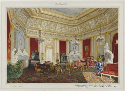 Lajos Rauscher: Sommersaal der Königin Olga von Württemberg im Neuen Schloss in Stuttgart, Deckfarben, Aquarell, Höhe x Breite (Blatt): 26,3 x 38,8 cm, 1868, Olga-Album, Blatt 23, Stuttgart, Staatsgalerie, Leihgabe der Freunde der Staatsgalerie, Inventarnummer C 1958/GVL 179,23. Links: Marmorkamin von Joseph von Kopf, 1867, Kratt 1998: Katalognummer 23 I, mit der Büste von Königin Olga und den liegenden Figuren von Prometheus und Gaia. Rechts: Marmorkamin von Joseph von Kopf, 1867, Kratt 1998: Katalognummer 23 II, mit der Büste von König Karl von Württemberg und den liegenden Figuren von Zephyr und Aphrodite. (Kratt 1998 = Regina Kratt: Joseph von Kopf: 1827 - 1903; das Werk des Bildhauers mit typologischen Studien zur Büste und Gruppe, Aachen/Mainz 1998 (zugleich: Karlsruhe, Universität, Dissertation, 1995), ISBN 3-89653-248-0.)